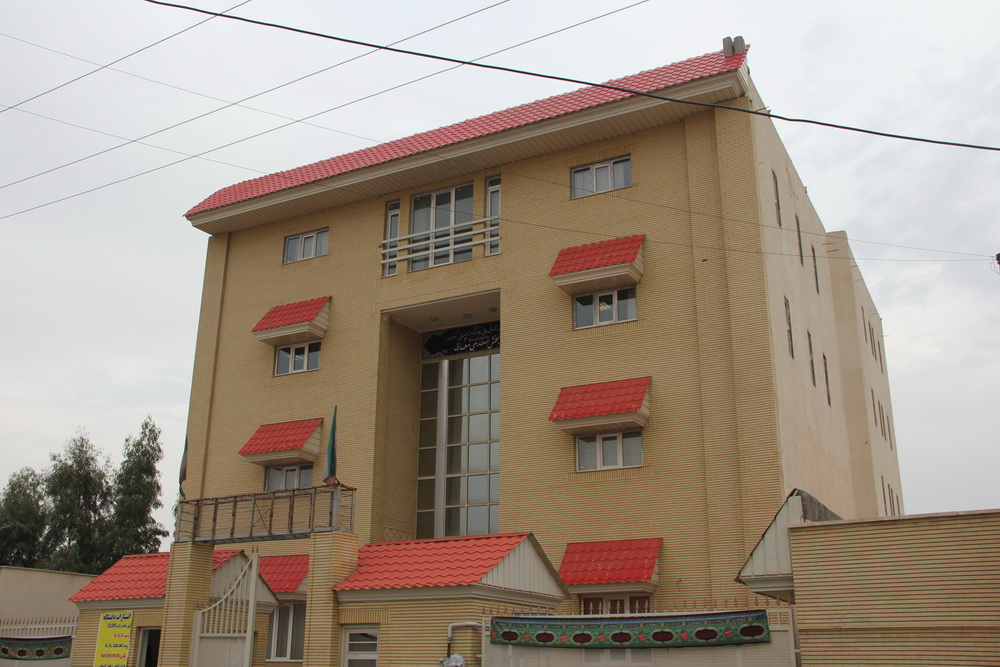 دانشکده معماری موسسه آموزش عالی علاءالدوله سمنانی